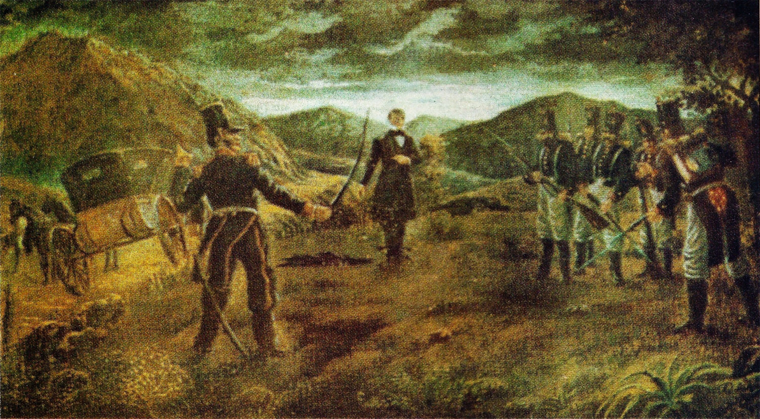 Fusilamiento de Diego Portales por C. Domeniconi.